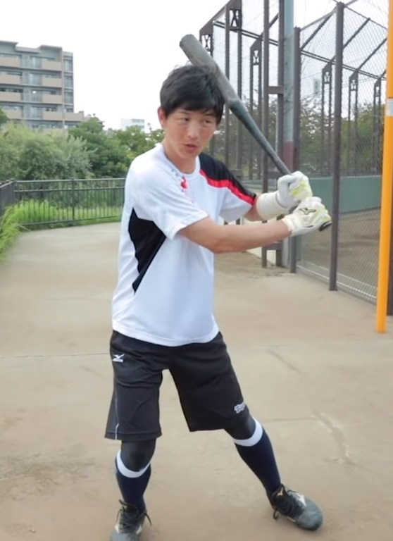 クニヨシTVに出演し、打撃理論を解説する元プロ野球選手の田上健一